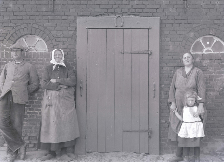 Hofbewohner an der Eingangstur eines Bauerhauses in Morsum